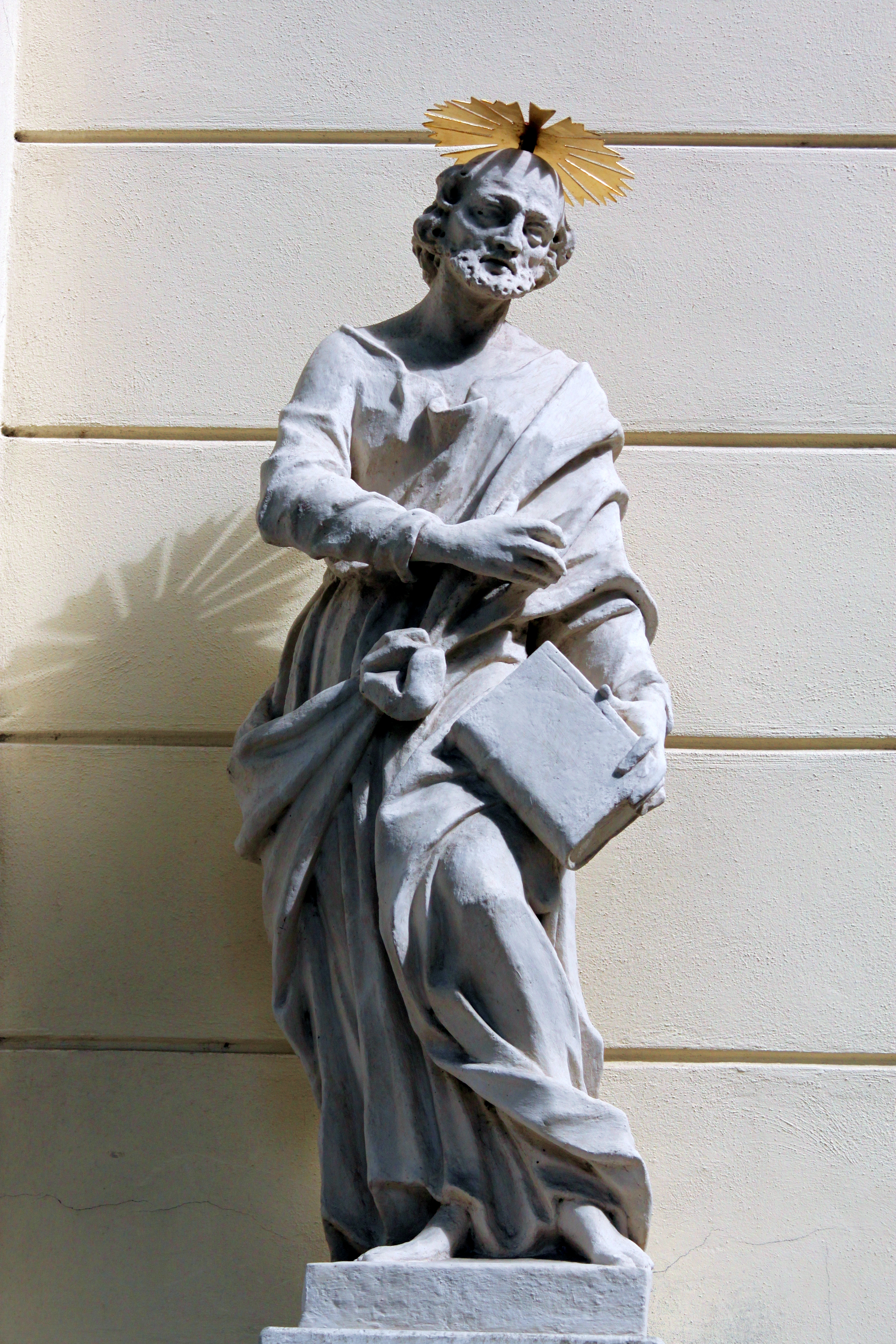 Hl. Petrus